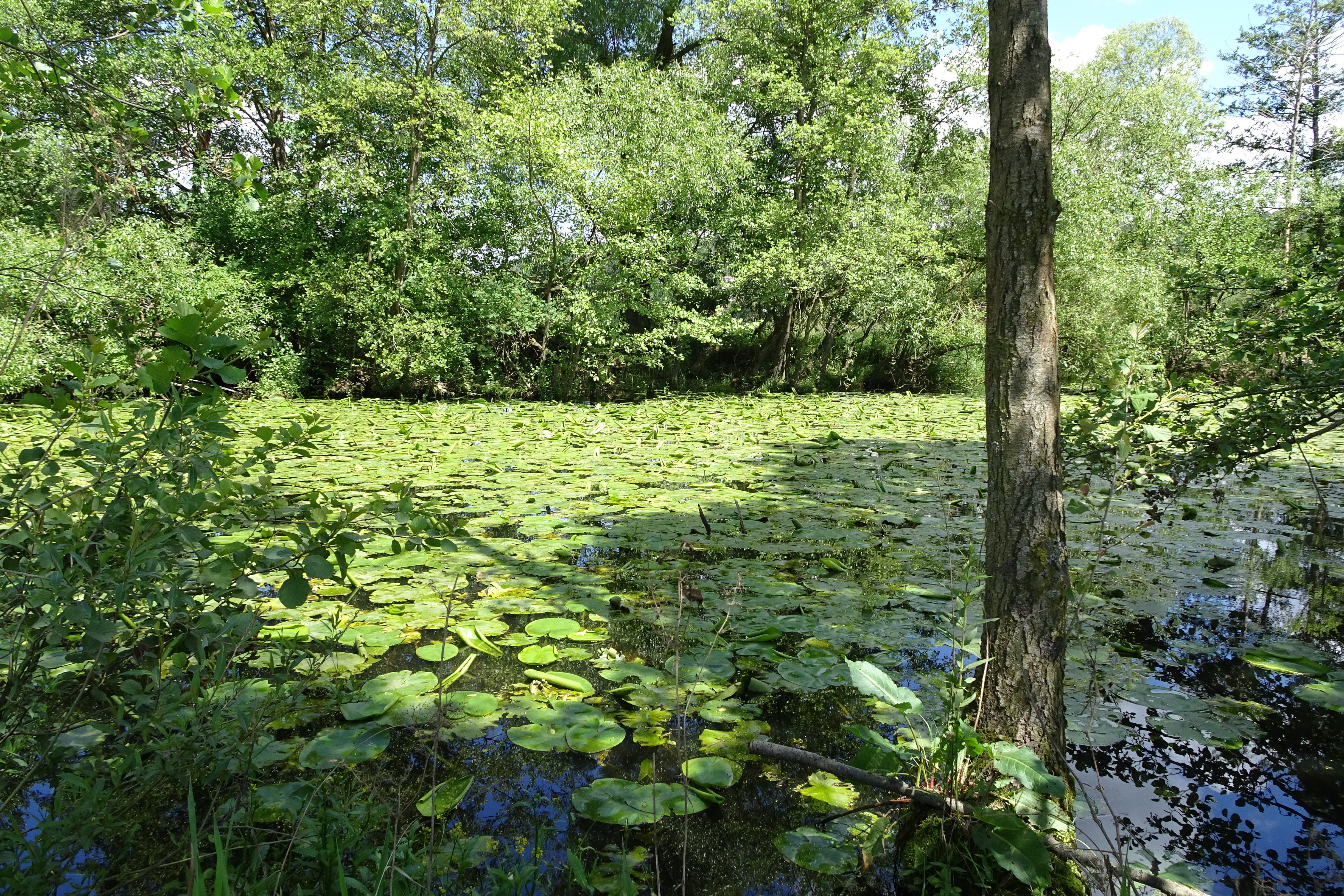 Die „Alte Fulda bei Asbach“ ist ein Altarm der Fulda mit bereits verlandeten Teilen im hessischen Landkreis Hersfeld-Rotenburg. Die noch offenen Wasserflächen werden von Schwimmblatt-Pflanzengesellschaften besiedelt. Die Ufer säumen Weiden und Erlen. Das umgebende Grünland in der Auenlandschaftdes Mittleren Fuldatals besteht aus Feuchtwiesen, in der in Hessen gefährdete Pflanzenarten vorkommen. Der gesamte Bereich weist Lebensräume und Arten auf, die wegen ihrer Besonderheit als schutzwürdig angesehen werden. Um deren Erhaltung sicherzustellen und Störungen fernzuhalten wurde die Fläche im Jahr 1984 als Naturschutzgebiet ausgewiesen. This is a picture of the protected area listed at WDPA under the ID 162087